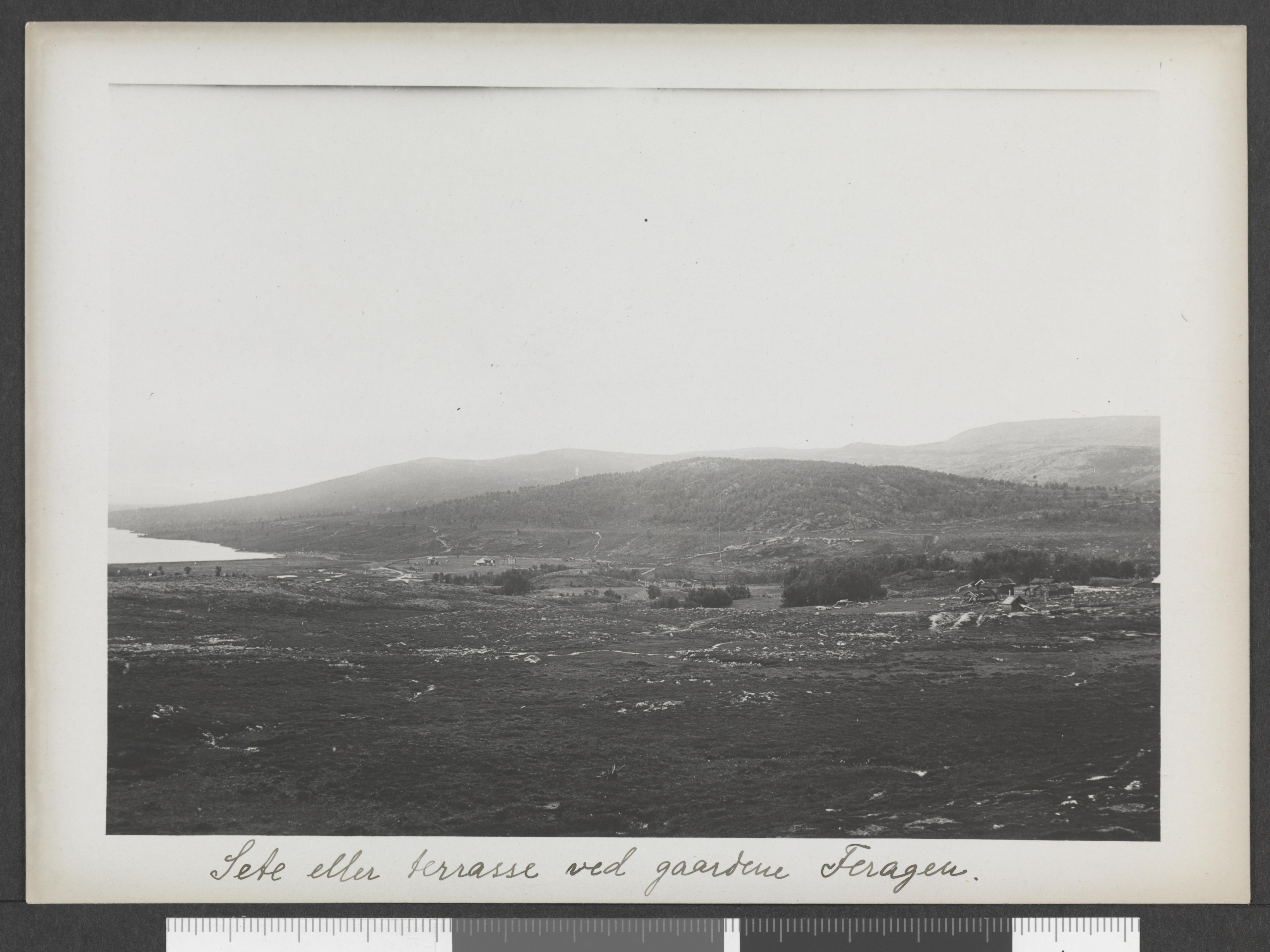 Bildet er hentet fra Nasjonalbibliotekets bildesamling. Anmerkninger til bildet var: Fotografiet lå i konvolutt merket: Sylen, Svartviken og Feragen 1911. Se også NGU nr. 73, 1915 hvor bildet er brukt med tittel: "Seten [...] ved Feragen paa nedre Glomsjøs høide" Feragen, Røros, Sør Trøndelag